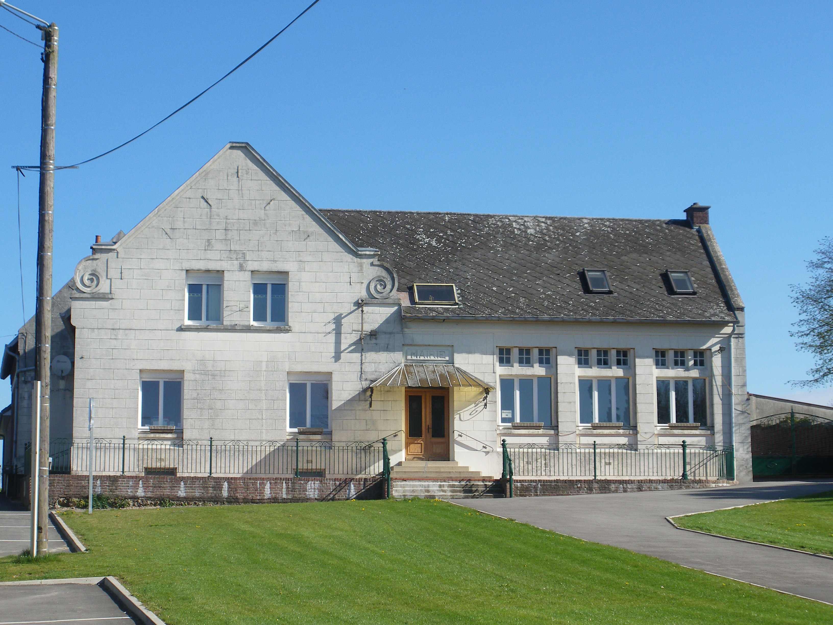 Vue de la mairie de Frémicourt.